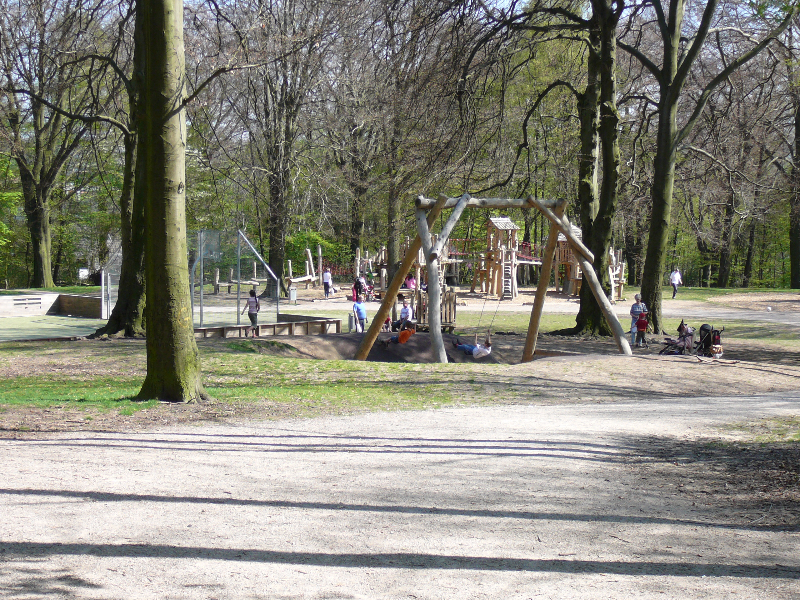 Nützenbergpark, Wuppertal